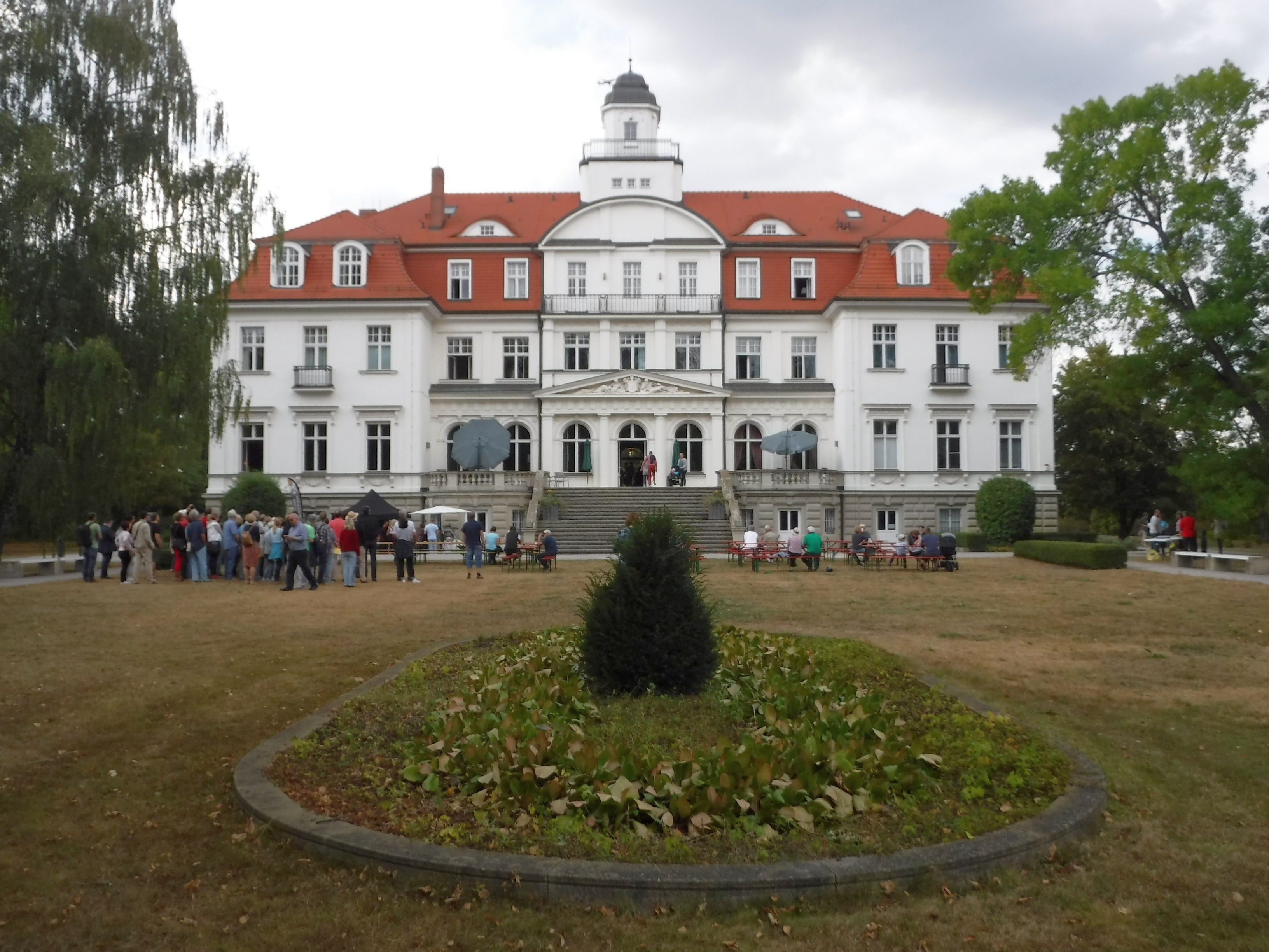 Schloss Genshagen, Ostfassade